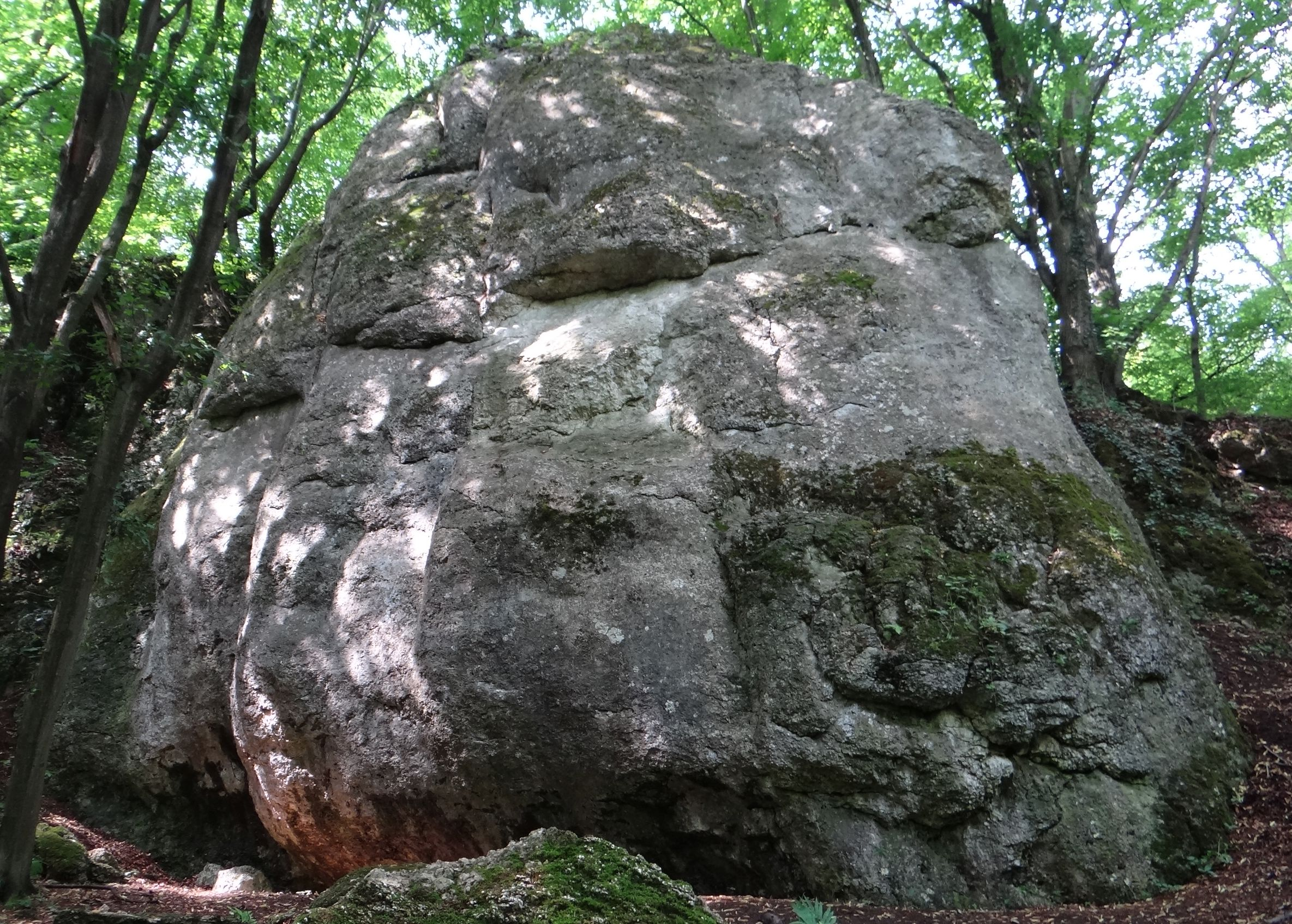 Skała Walec z Lesie Zabierzowskim na Garbie Tenczyńskim